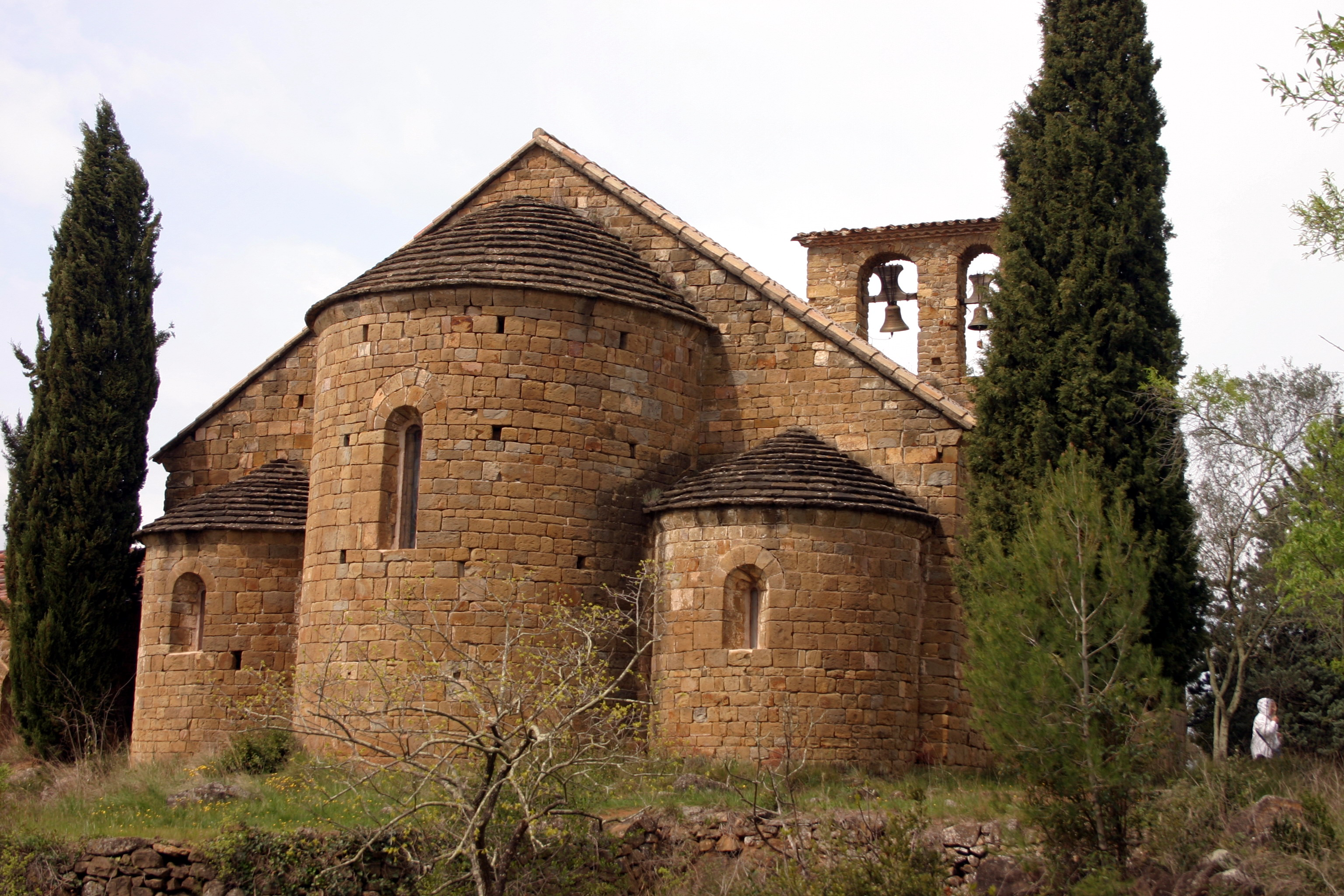 Església de Sant Sepulcre de Palera (Beuda, la Garrotxa, Catalonia, Spain) Romànic / Románico / Romanesque s.XI.